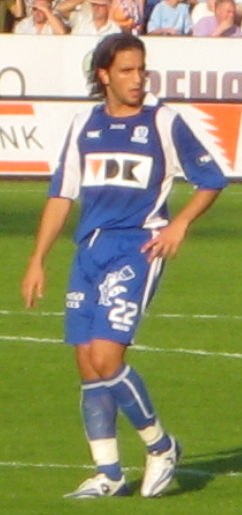 Massimo Moia un joueur professionnel de KAA Gent (cropped version of original image)